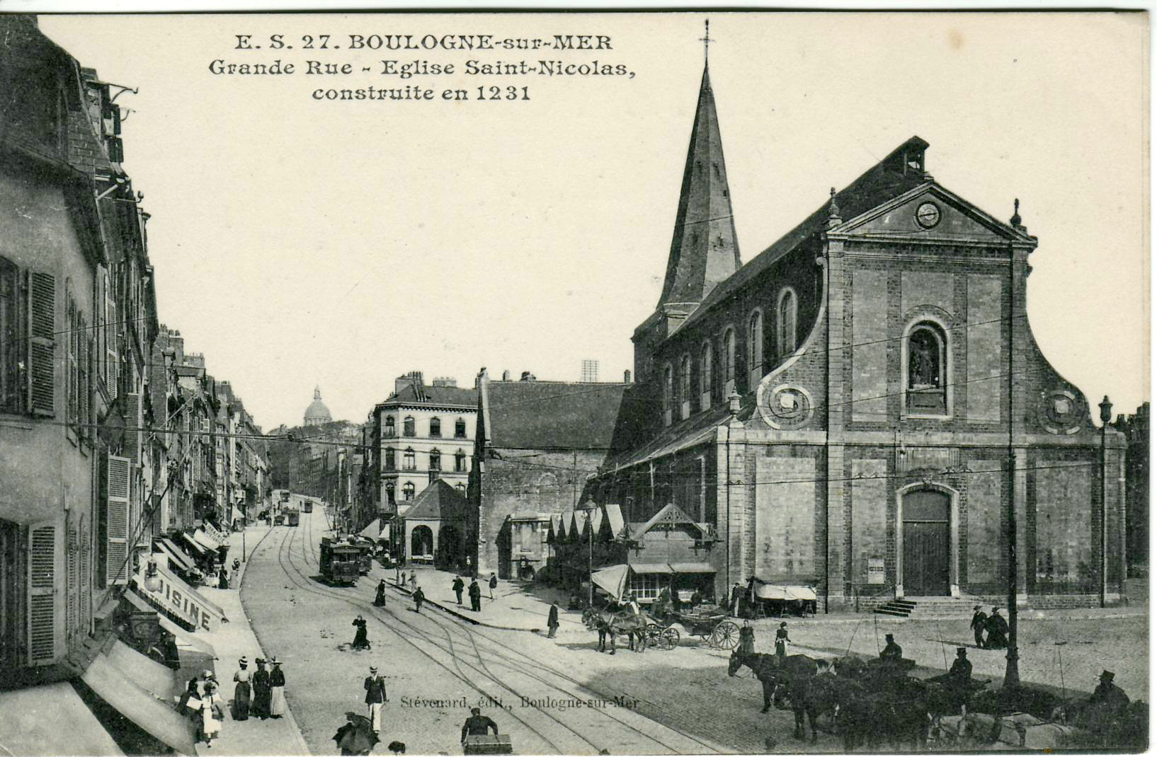 Carte postale ancienne éditée par ES 27 - Stévenard, éditeur à Boulogne-sur-Mer, n°27 : BOULOGNE-SUR-MER - Grande Rue - Eglise Saint- Nicolas, construite en 1231